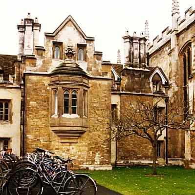 studeerkamer van Newton met symbolische appelboom. Eigen foto.